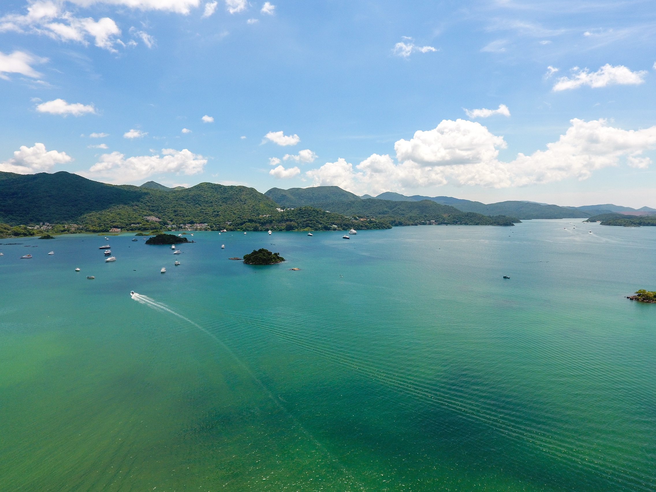 Tai Mong Tsai